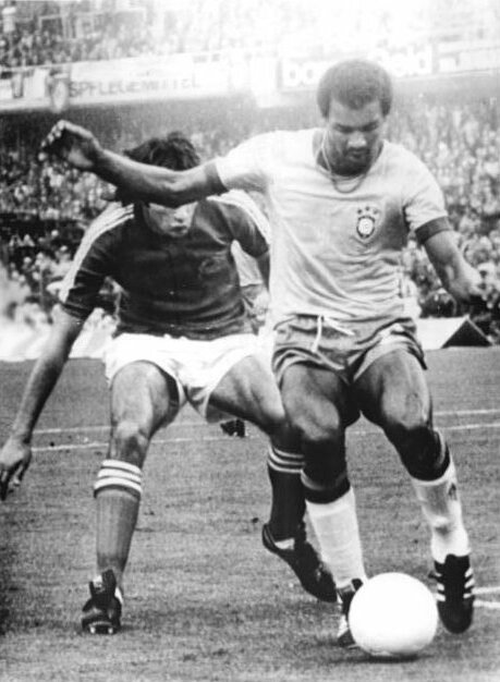 ADN-ZB-AP-Tele-13.6.74-ma-Frankfurt-Main: Fußball-Weltmeisterschaft 1974- 1. Finalrunde, Gruppe 2: Titelverteidiger Brasilien - Jugoslawien 0:0- Im Kampf um den Ball der Brasilianer Luis Pereira (rechts) und Drazen Muzinio (Jugoslawien-dahinter).